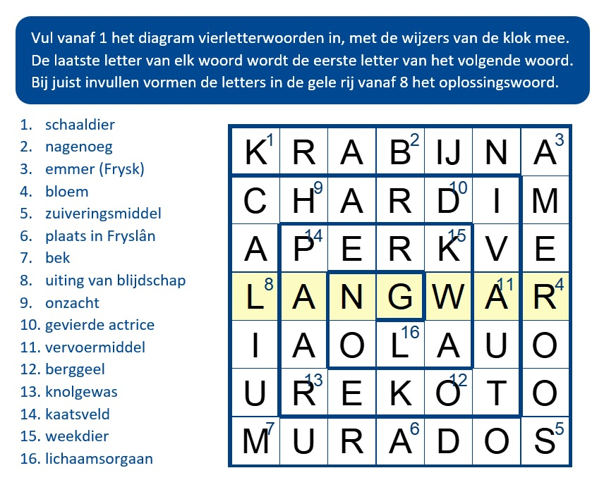 Plaats de woorden in één richting, in dit geval rechtsom